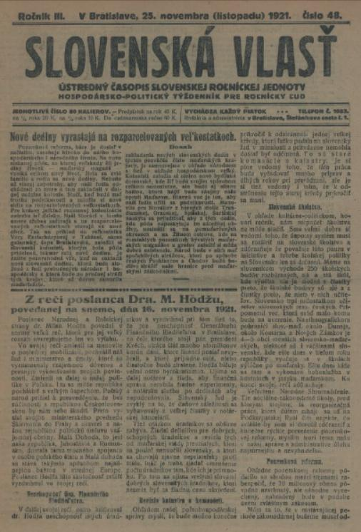 Titulný list týždenníka Slovenská vlasť, ktorý vychádzal na Slovensku po prvej sv. vojne.